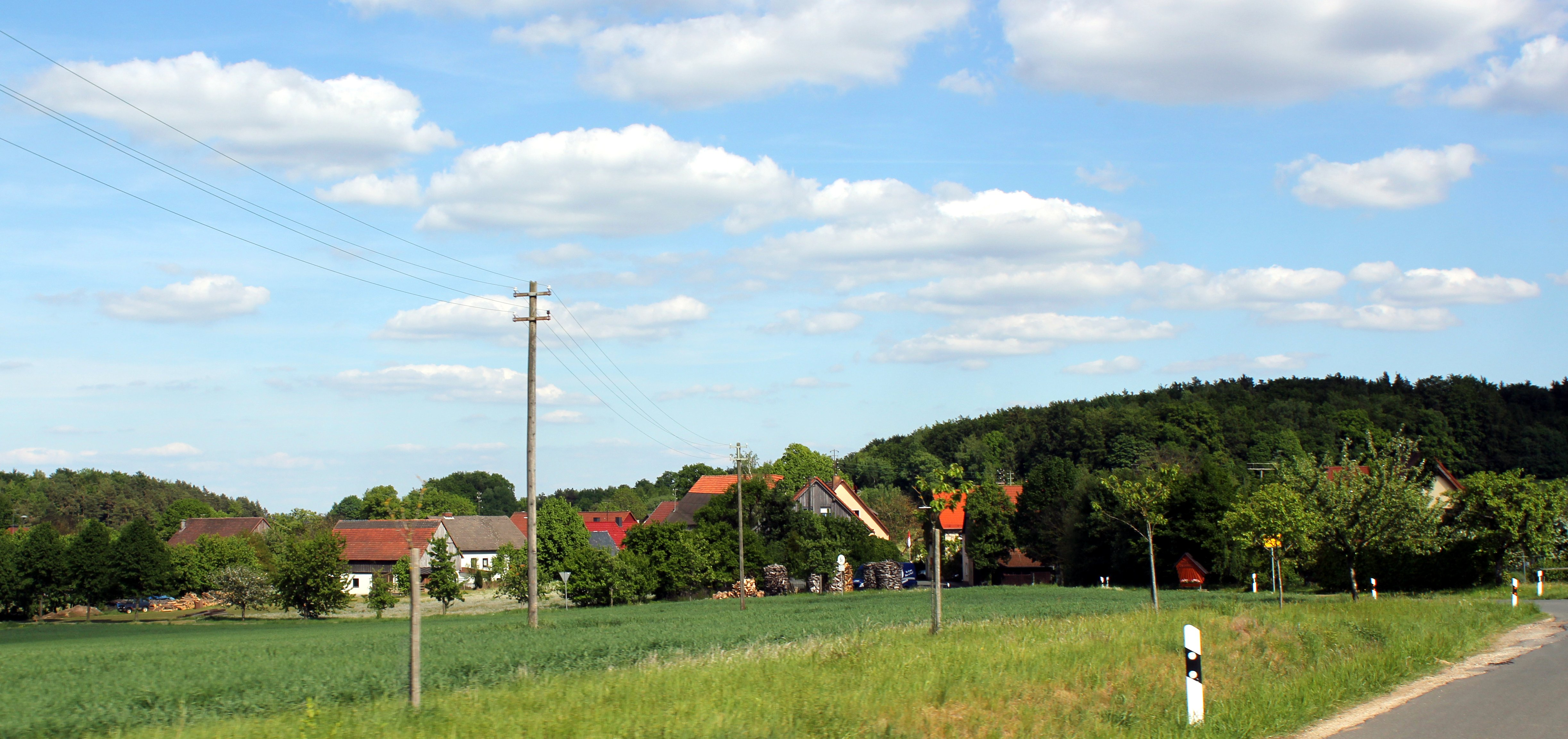 Bojendorf von Westen aus gesehen